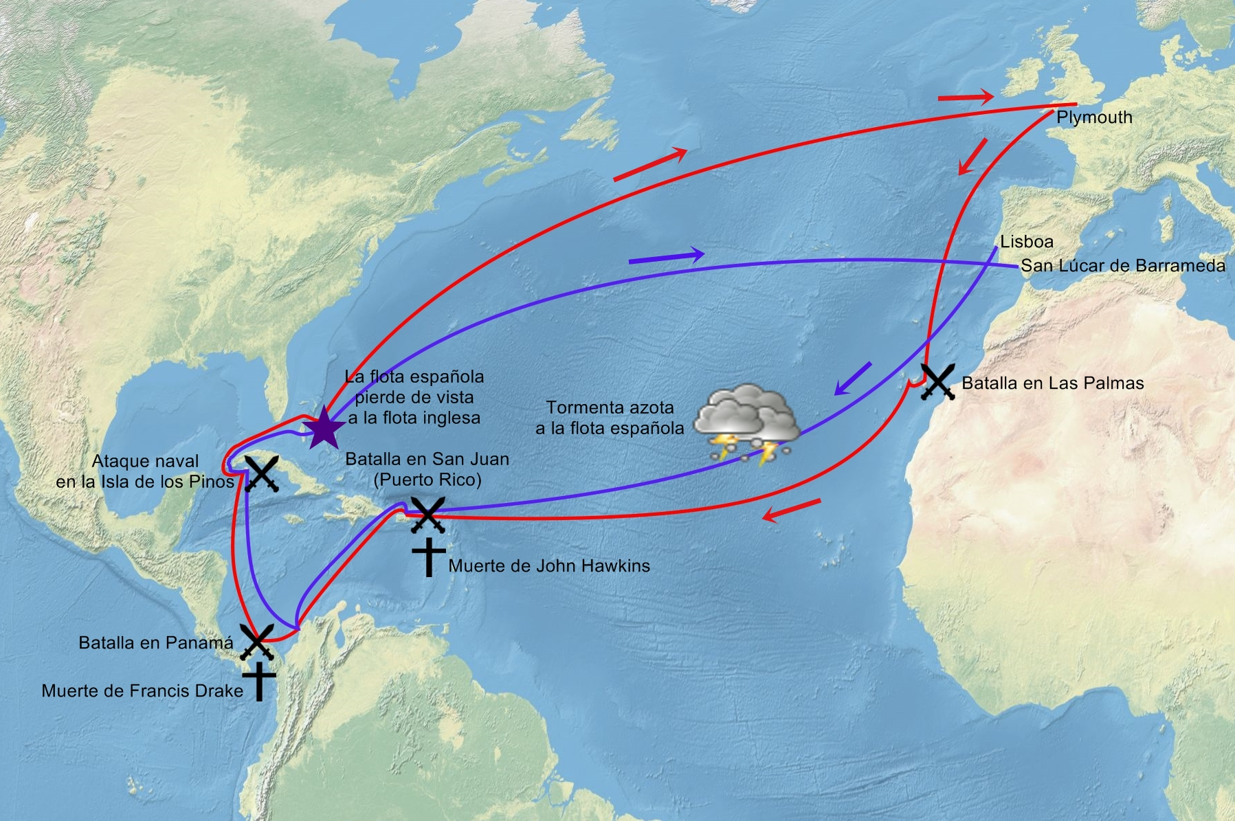 Recorrido aproximado de la expedición de Francis Drake y de John Hawkins de 1595-1596 (en rojo) y del seguimiento y final ataque naval de la flota de Bernardino de Avellaneda y don Juan Gutiérrez de Garibay (en azul). El mapa sobre el que se han colocado las indicaciones es obra de Ktrinko, y se encuentra con el nombre de Eckert4.jpg.